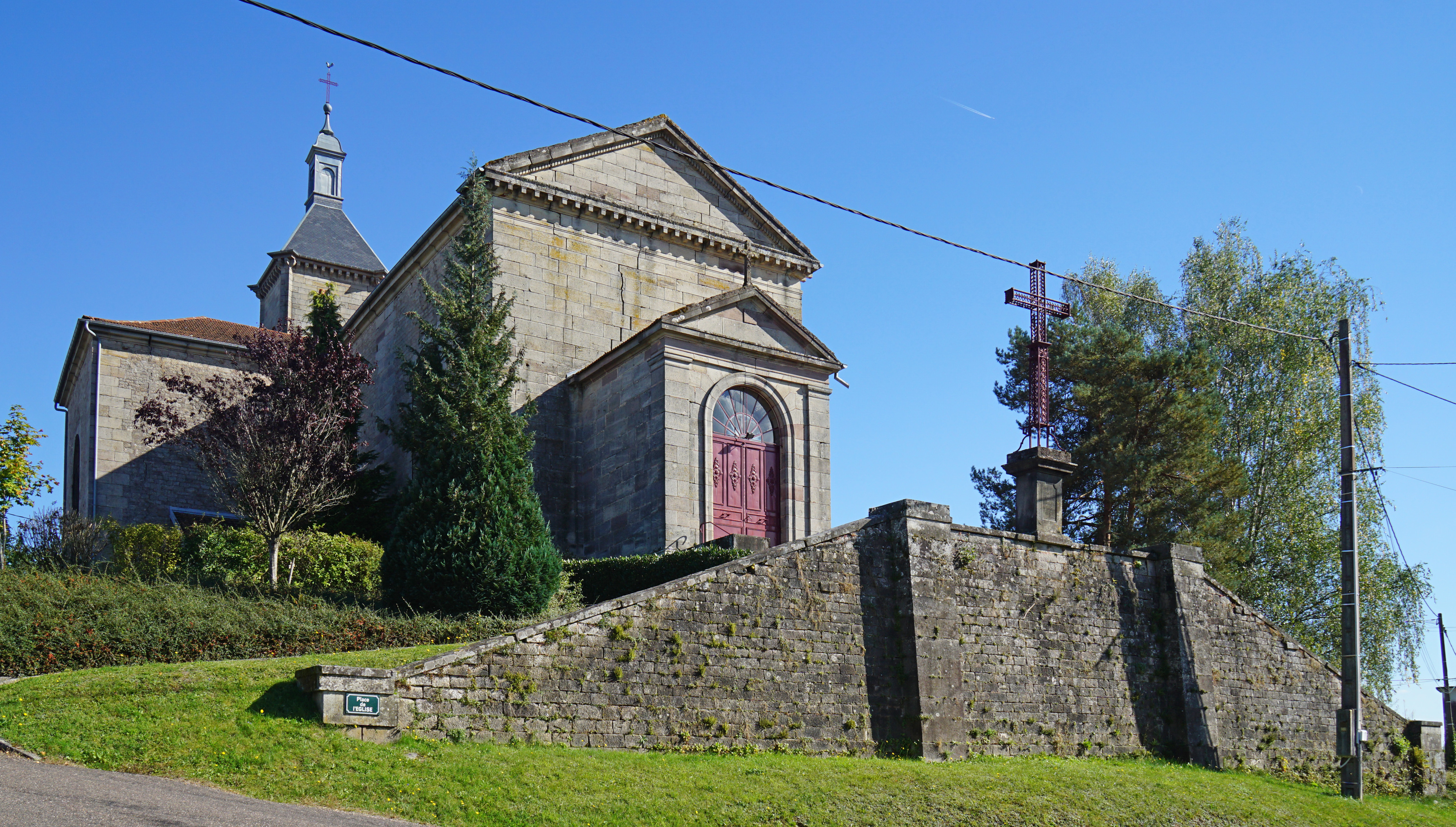 L'église de l'Assomption de Belmont.